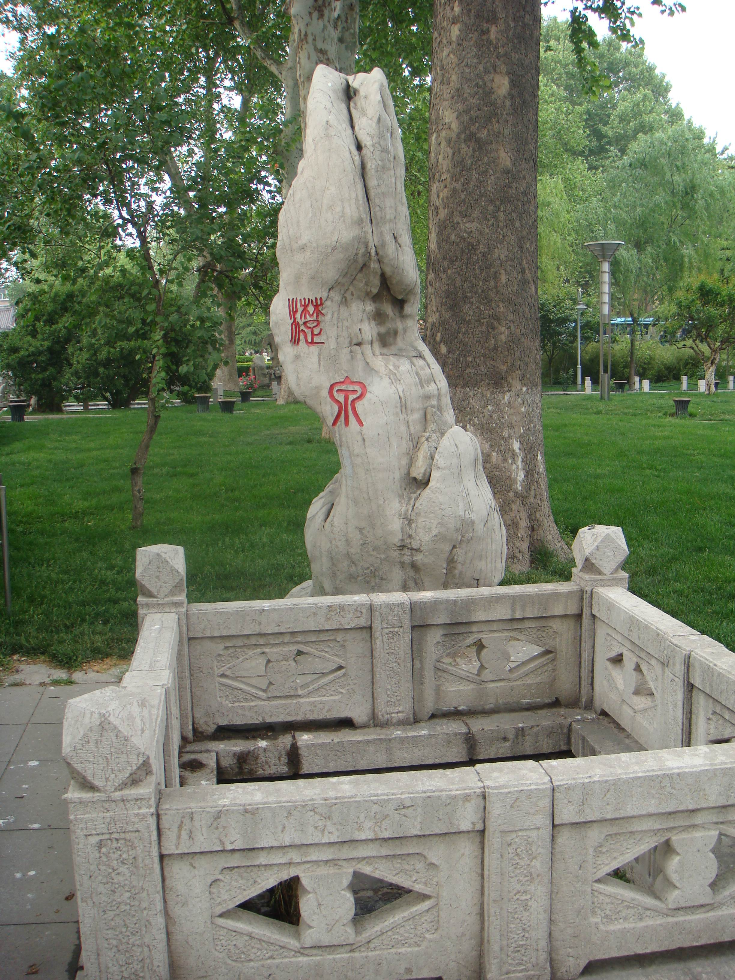 济南濋泉，七十二名泉之一。